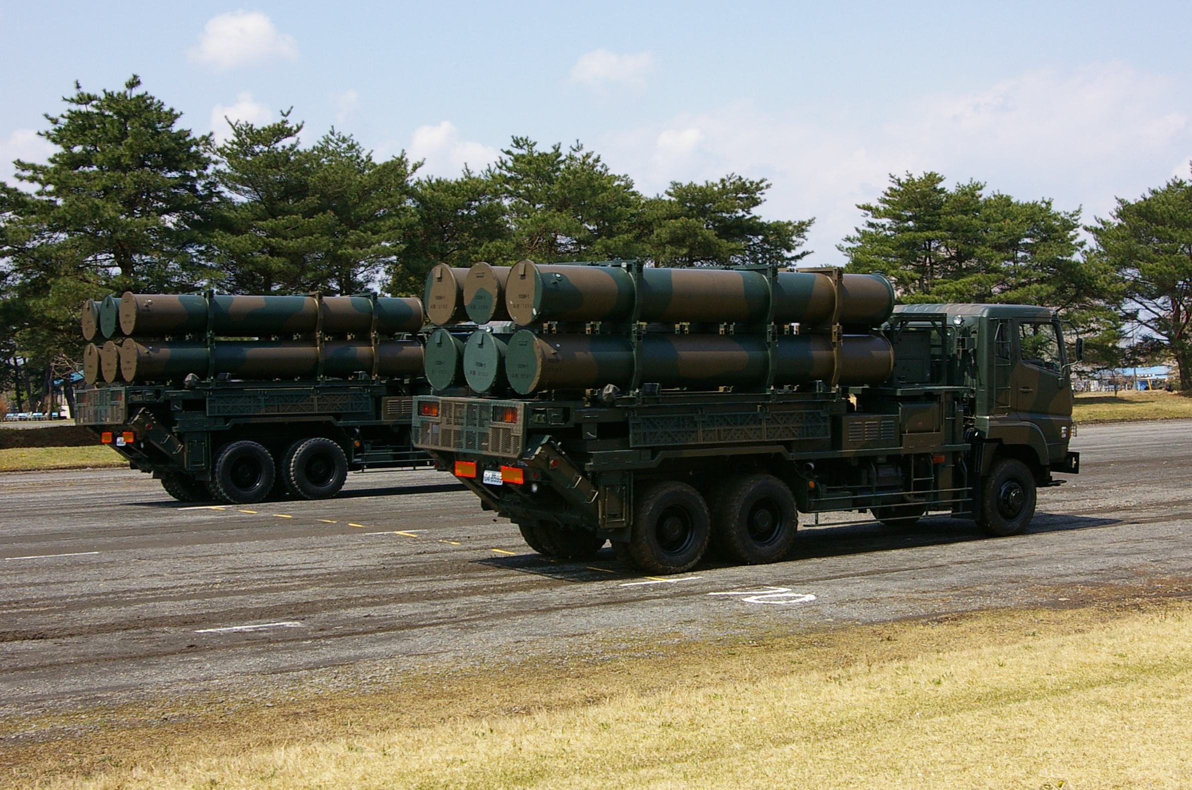 Taken by los688,8-Apr-2007,JGSDF Camp-Utsunomiya.JGSDF Type88 SSM.PD-self.ja:2007年4月8日、投稿者撮影。陸上自衛隊宇都宮駐屯地創立57周年記念行事。88式地対艦ミサイル、第6地対艦ミサイル連隊。